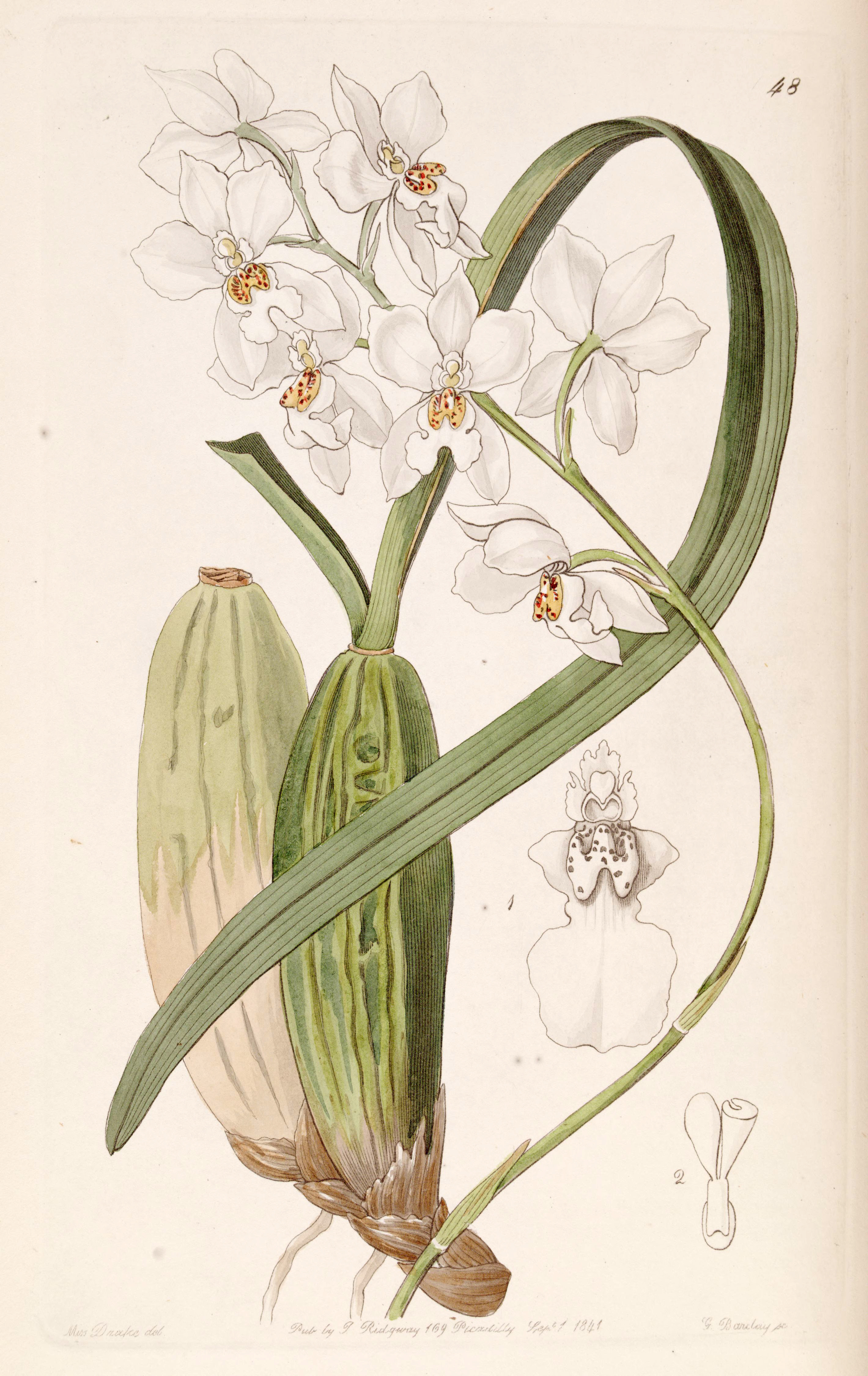 Cuitlauzina pulchella or Odontoglossum pulchellum or Osmoglossum pulchellum